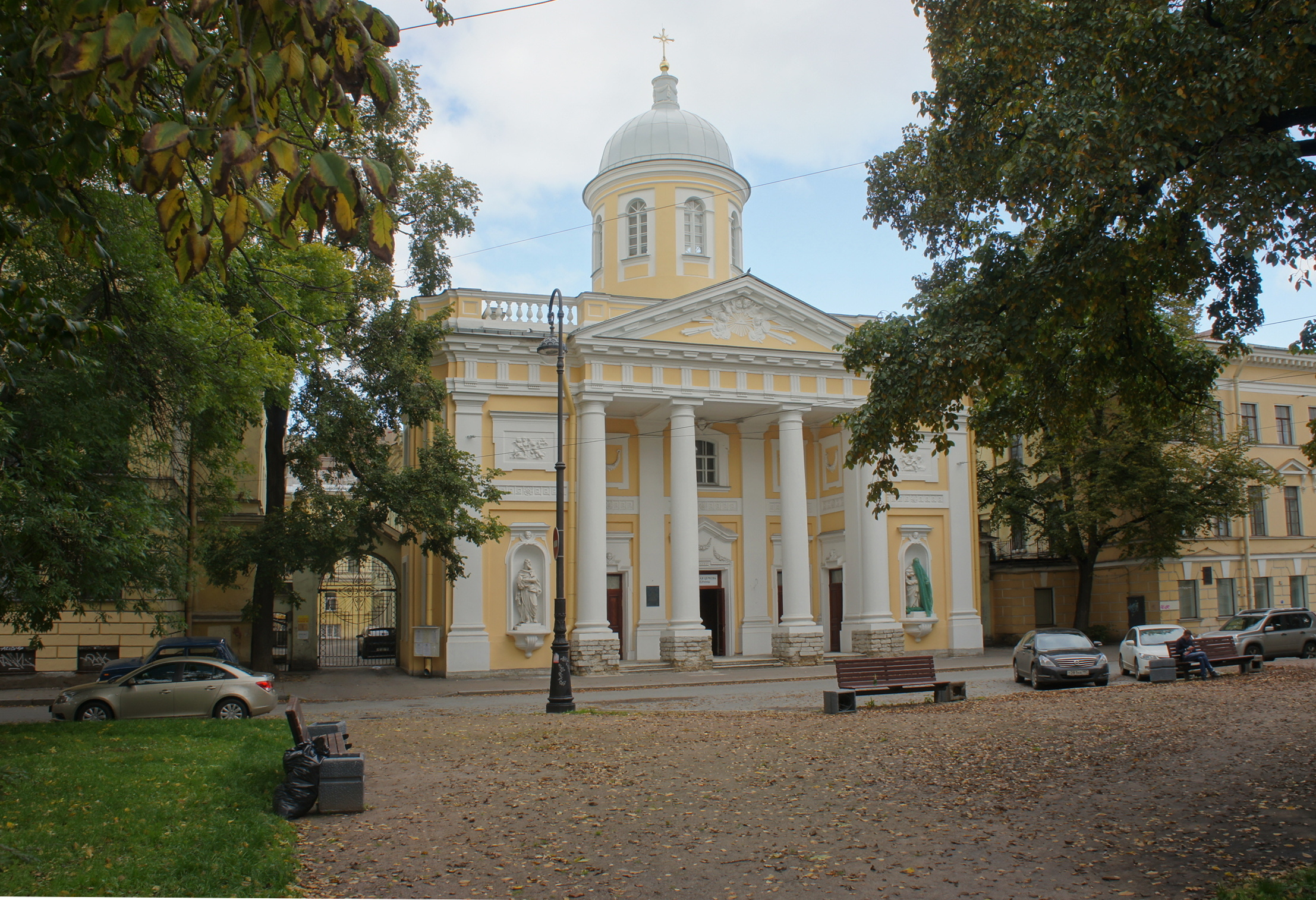 Евангелическо-лютеранский храм Святой Екатерины. Большой просп. Васильевского острова, 1, 1-я линия Васильевского острова, 20-а, 20-б, Репина ул., 21